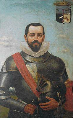 Domingo Martínez de IralaÑuflo de Chaves